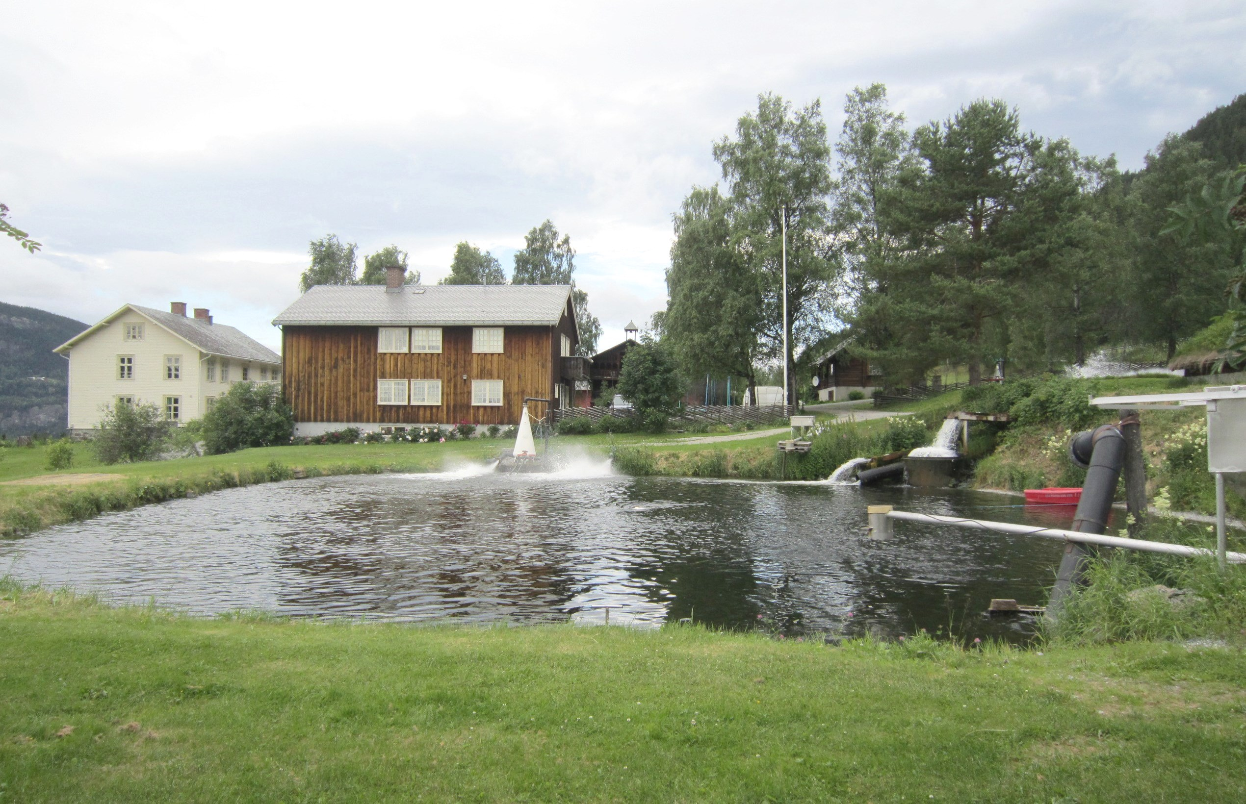 Noraker gård i Aurdal, en av produsentene tilsluttet Valdres Rakørret.